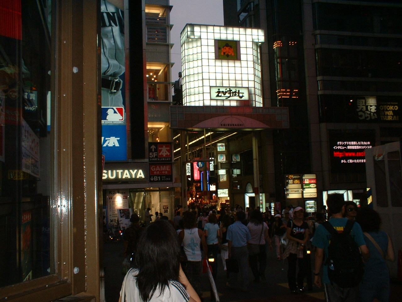 Shinsaibashi (心斎橋)